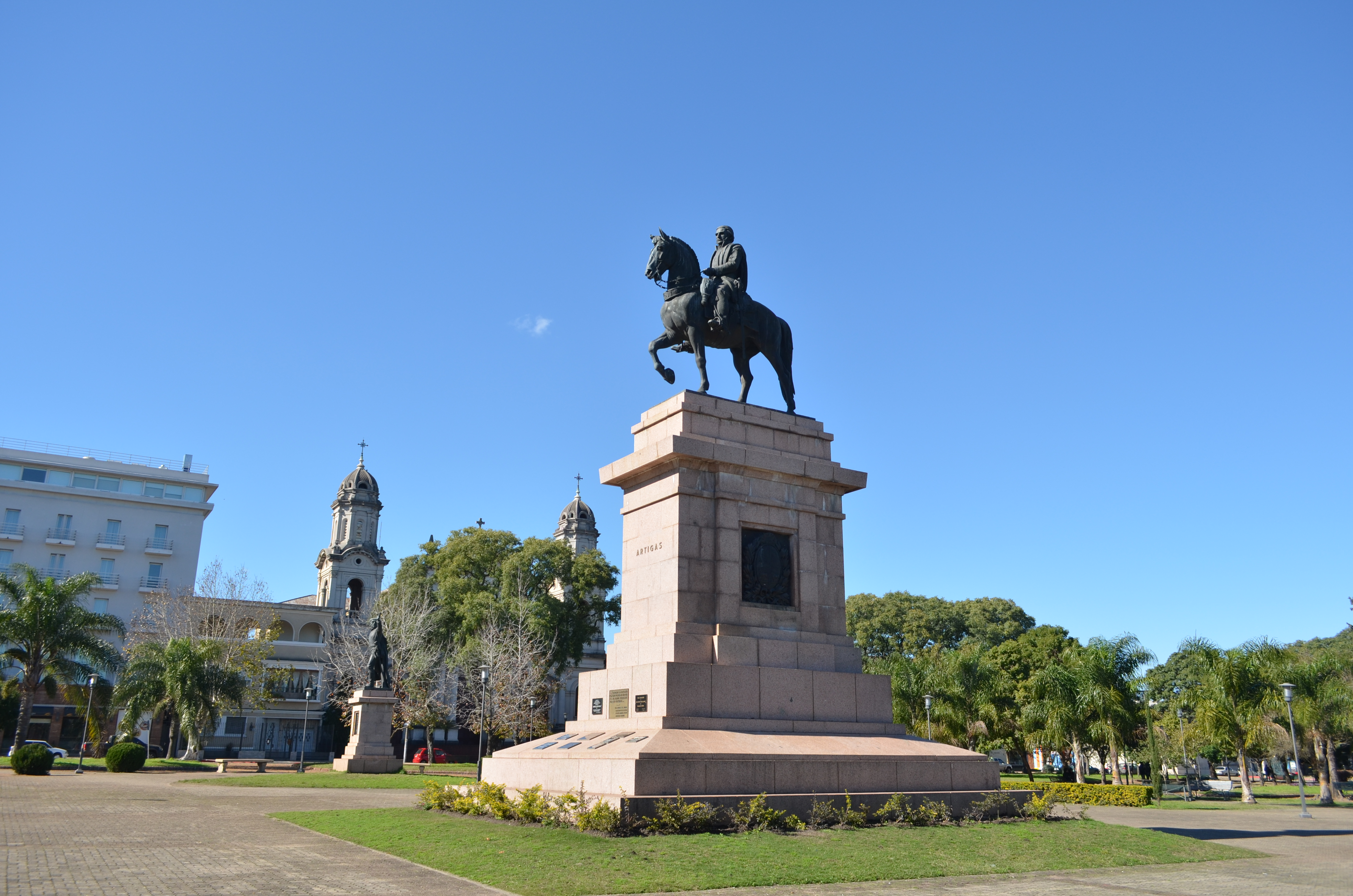 Plaza Artigas en Salto